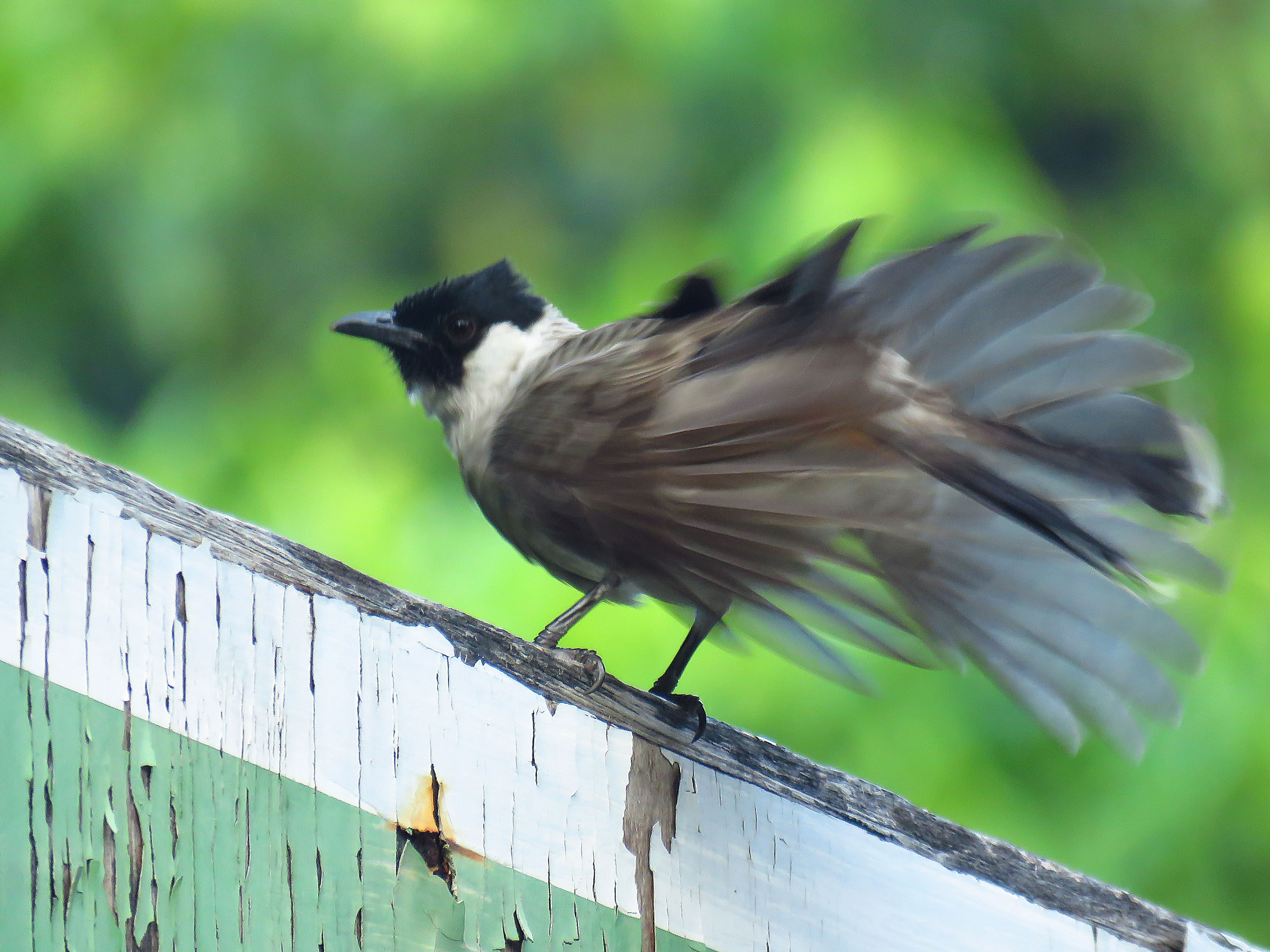 Seekor Cucak Kutilang (Pycnonotus aurigaster) sedang sunbathing (mandi matahari) dan membersihkan bulu-bulunya